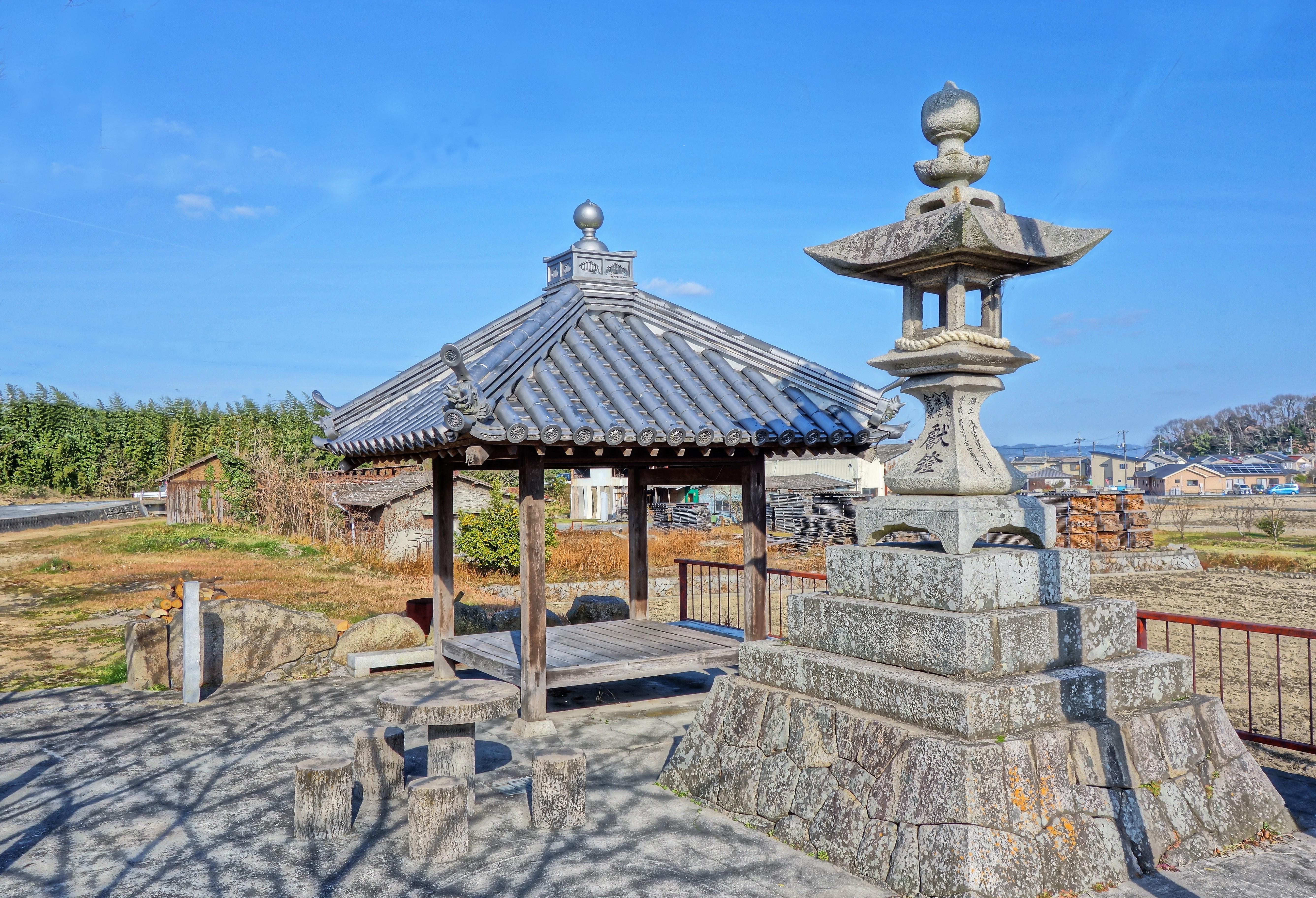 福山市駅家町向永谷の光の丘病院近くにある辻堂。平成5年7月に建立140年記念として新築復元されている。横にある灯篭は嘉永5年建立。